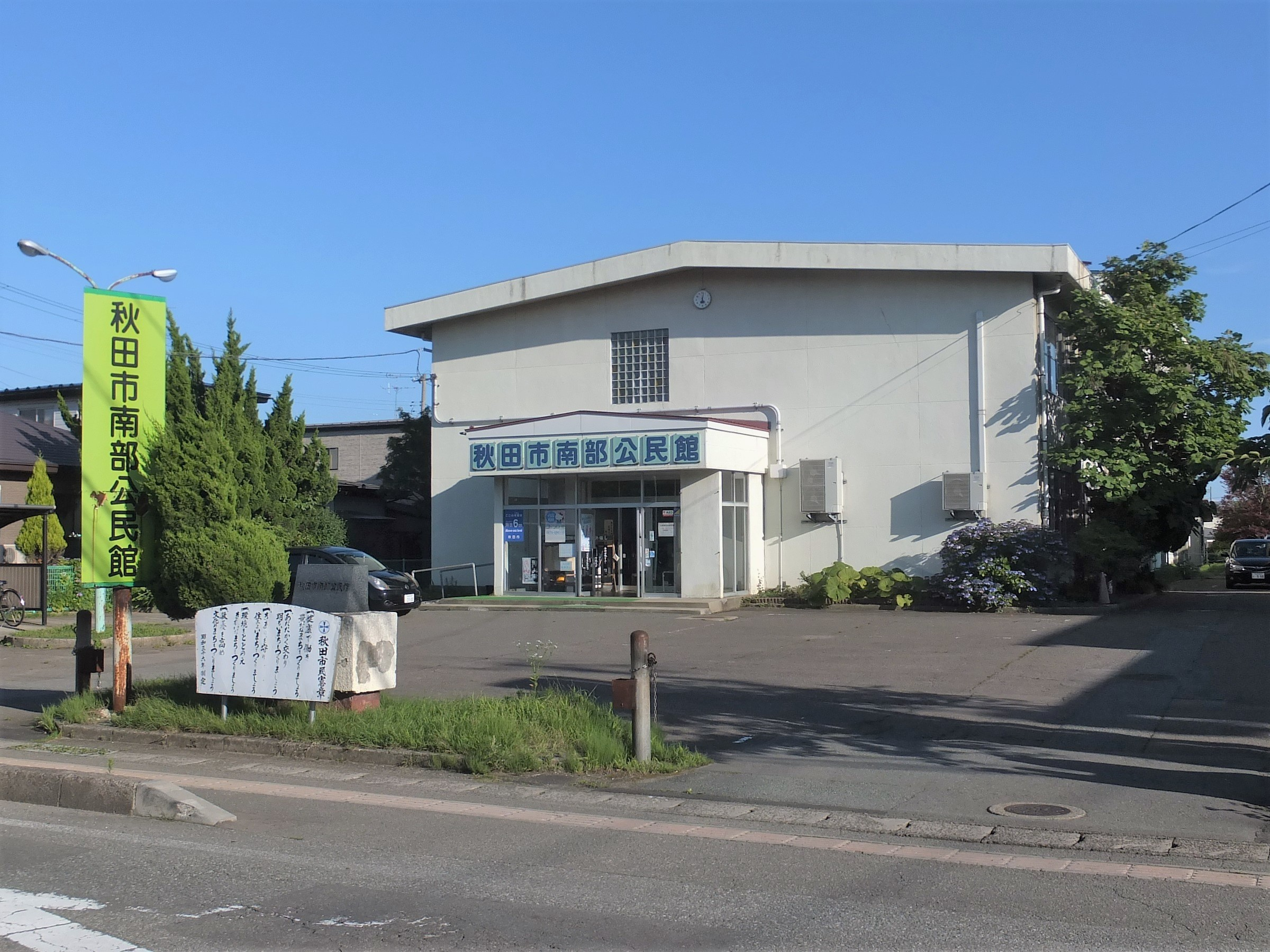 秋田市南部公民館（秋田市牛島東）。2016年度中の使用停止と解体が決定しており、解体後の跡地には(仮称)秋田市南部市民サービスセンター牛島別館が整備される予定である。